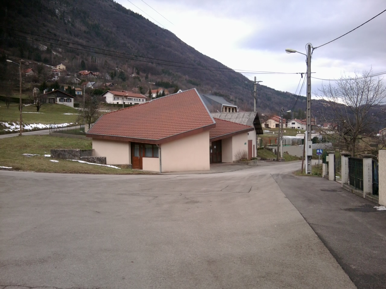 Saint-Pierre-de-Mésage (38) : La salle des fêtes.